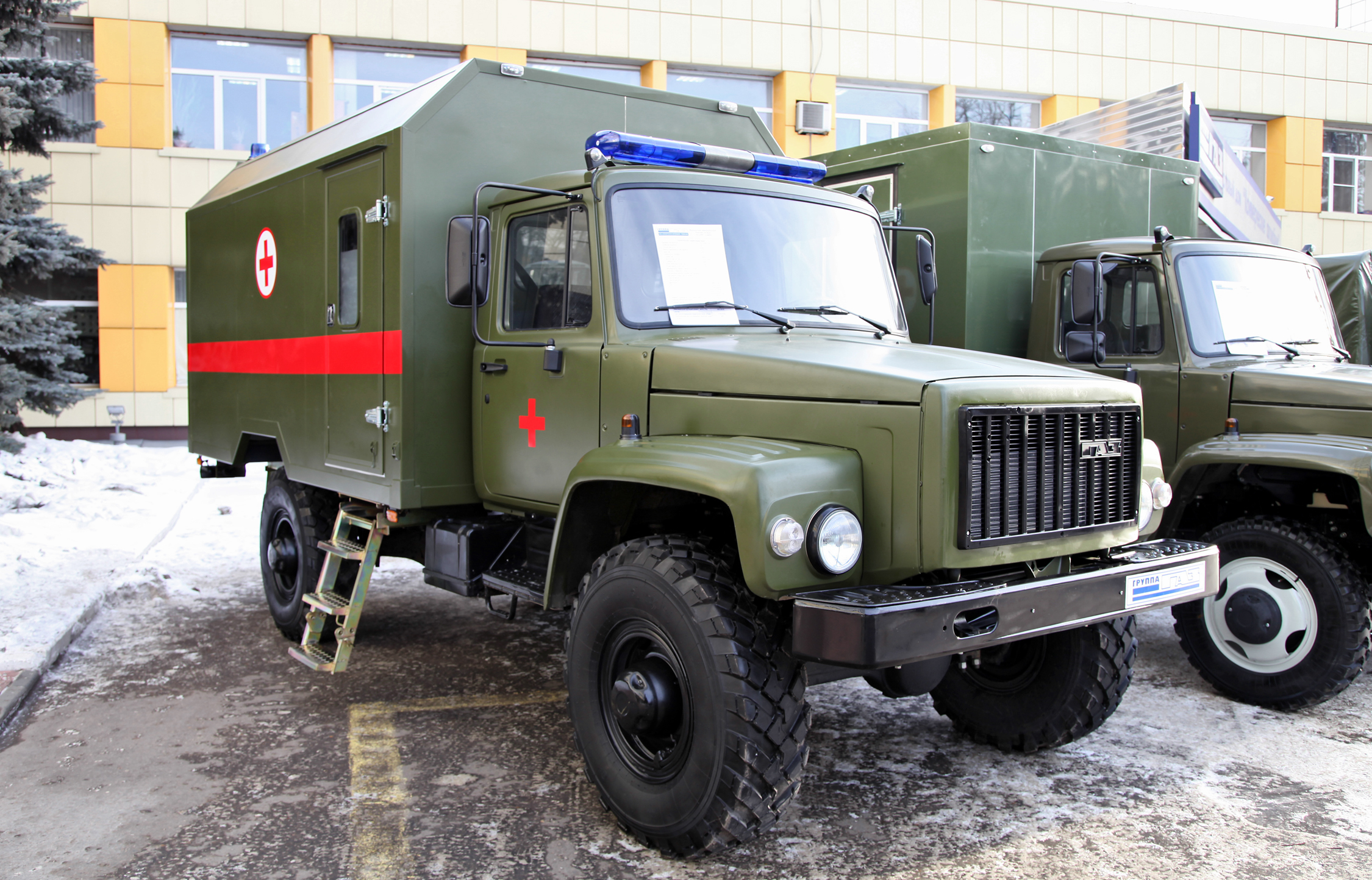 Медицинский эвакуационный комплекс ГАЗ-33081-1091 на базе ГАЗ-33081 Садко (Medic vehicle GAZ-33081-1091 on GAZ-33081 Sadko chassis)